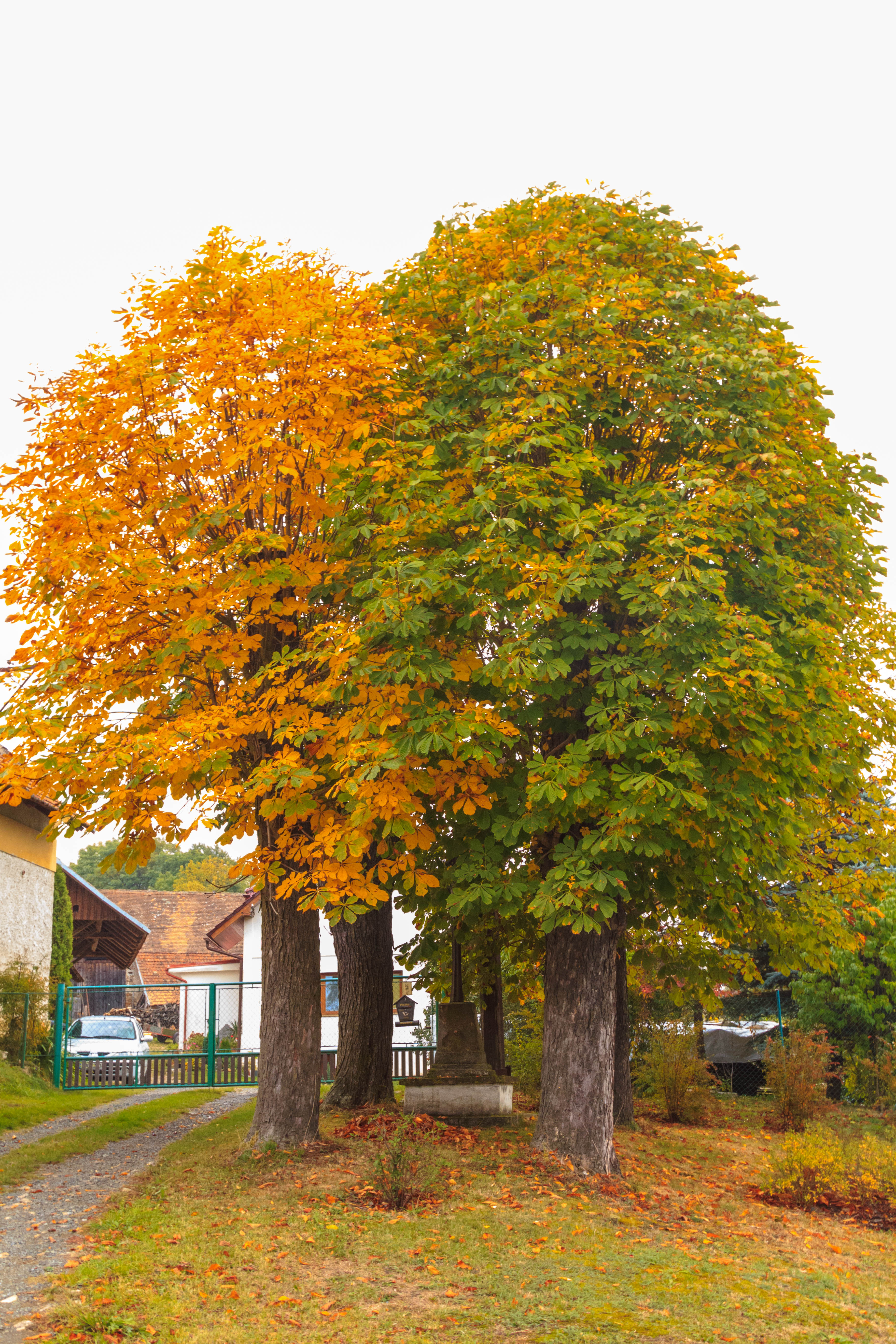 Kraborovice kříž